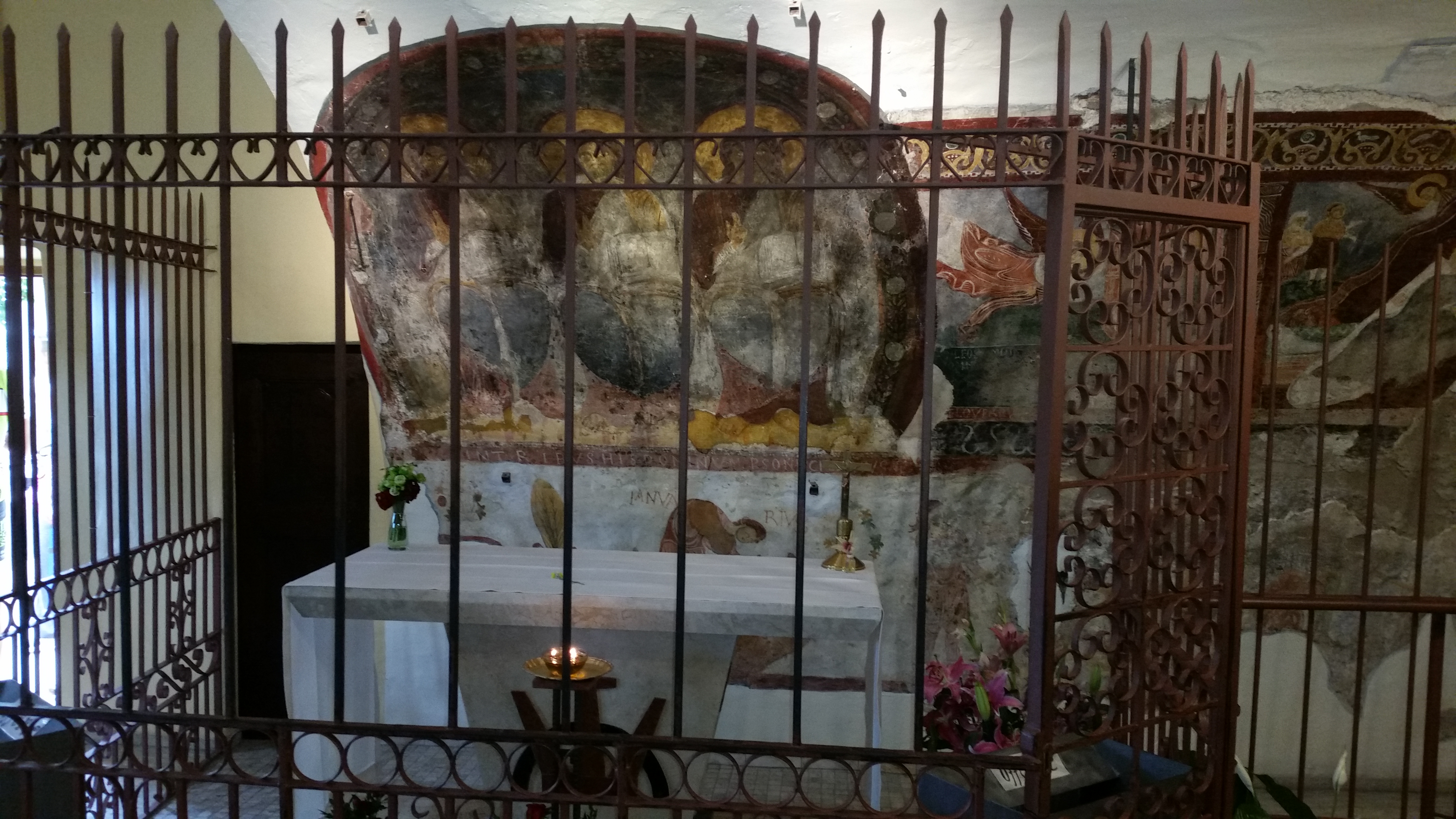 Affreschi del santuario della Santissima Trinità di Vallepietra